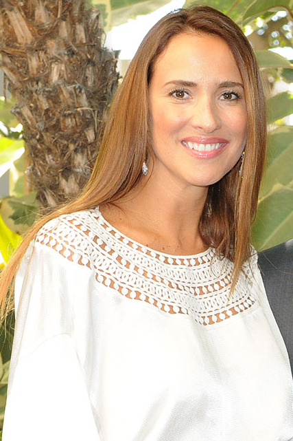 El presidente de Chile, Sebastián Piñera, participa en el desayuno de trabajo empresarial Chile-California, oportunidades de negocios, organizado por Pro-Chile y la Cámara de Comercio de Los Ángeles. En la foto: Angélica Castro, Sebastián Piñera y Cristián de la Fuente.